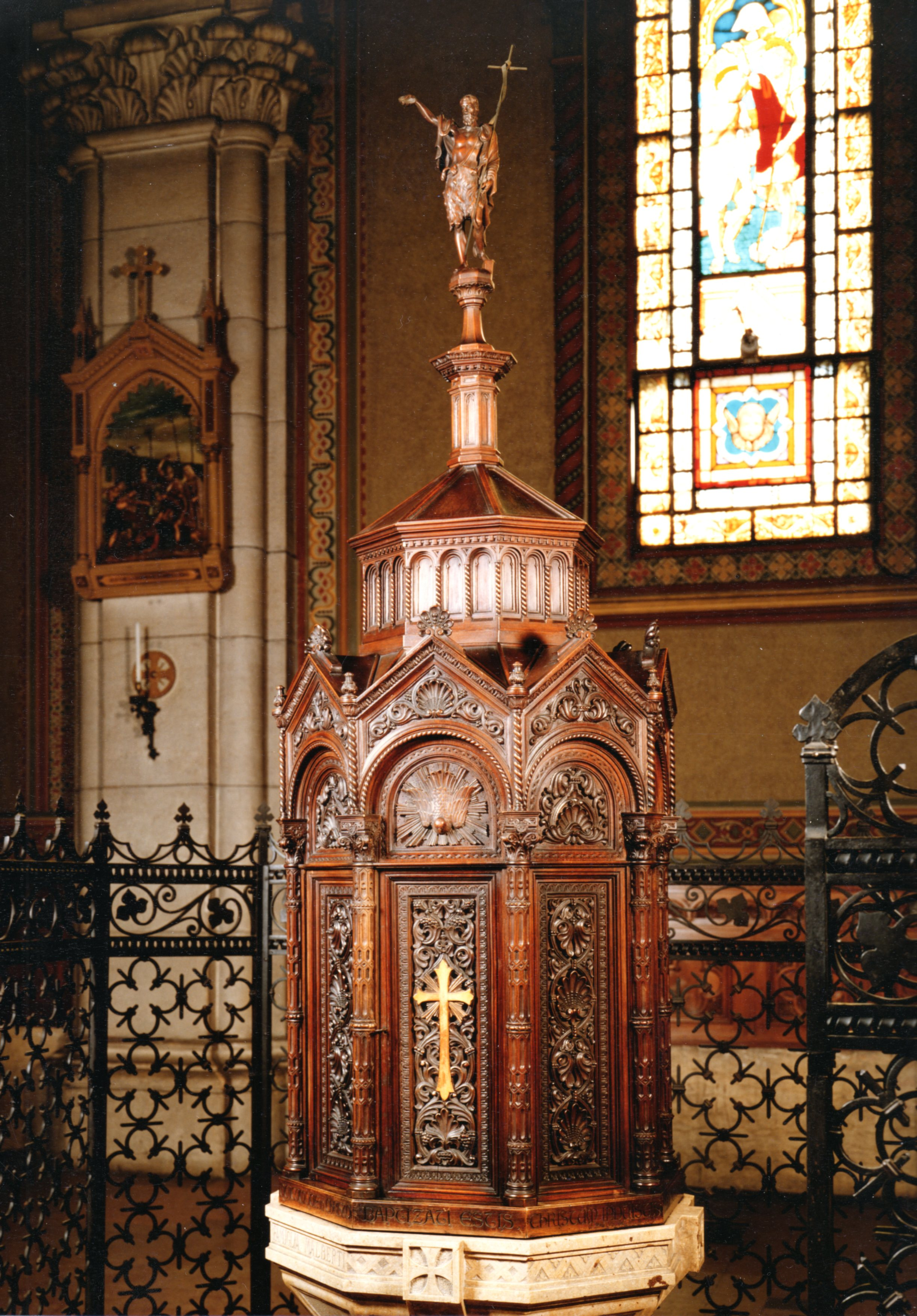 Tempietto ligneo ottagonale che racchiude il Fonte Battesimale, interamente intagliato da Ambrogio Fossati nel 1938 situato nel Duomo di Lissone (MB).